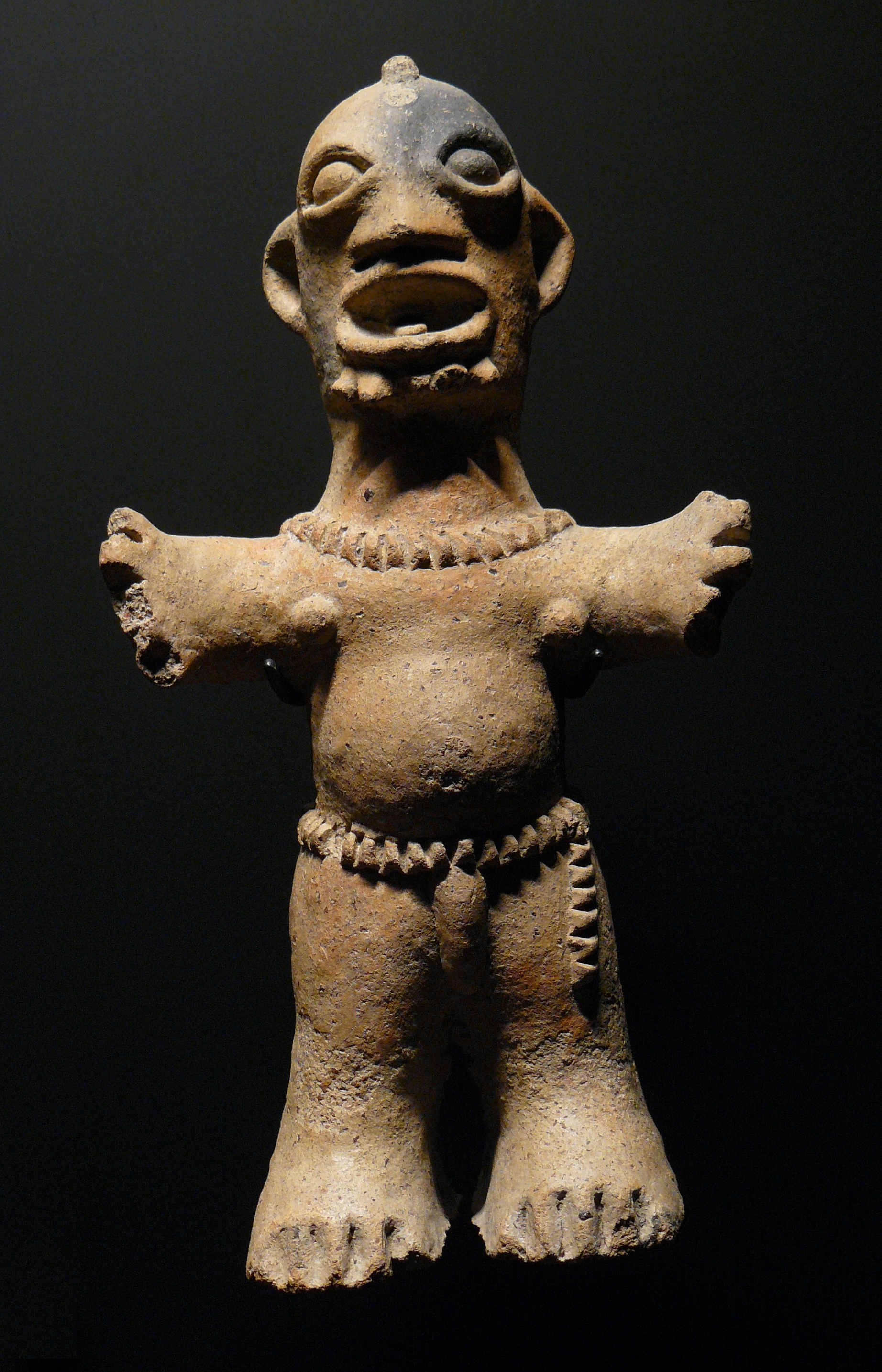 Statuette masculine - population Koma - Ghana - 13/16ème siècle - terre cuite, env. 30 cm - Musée du quai Branly - Paris - n° d'inventaire : 73-1987-3-1